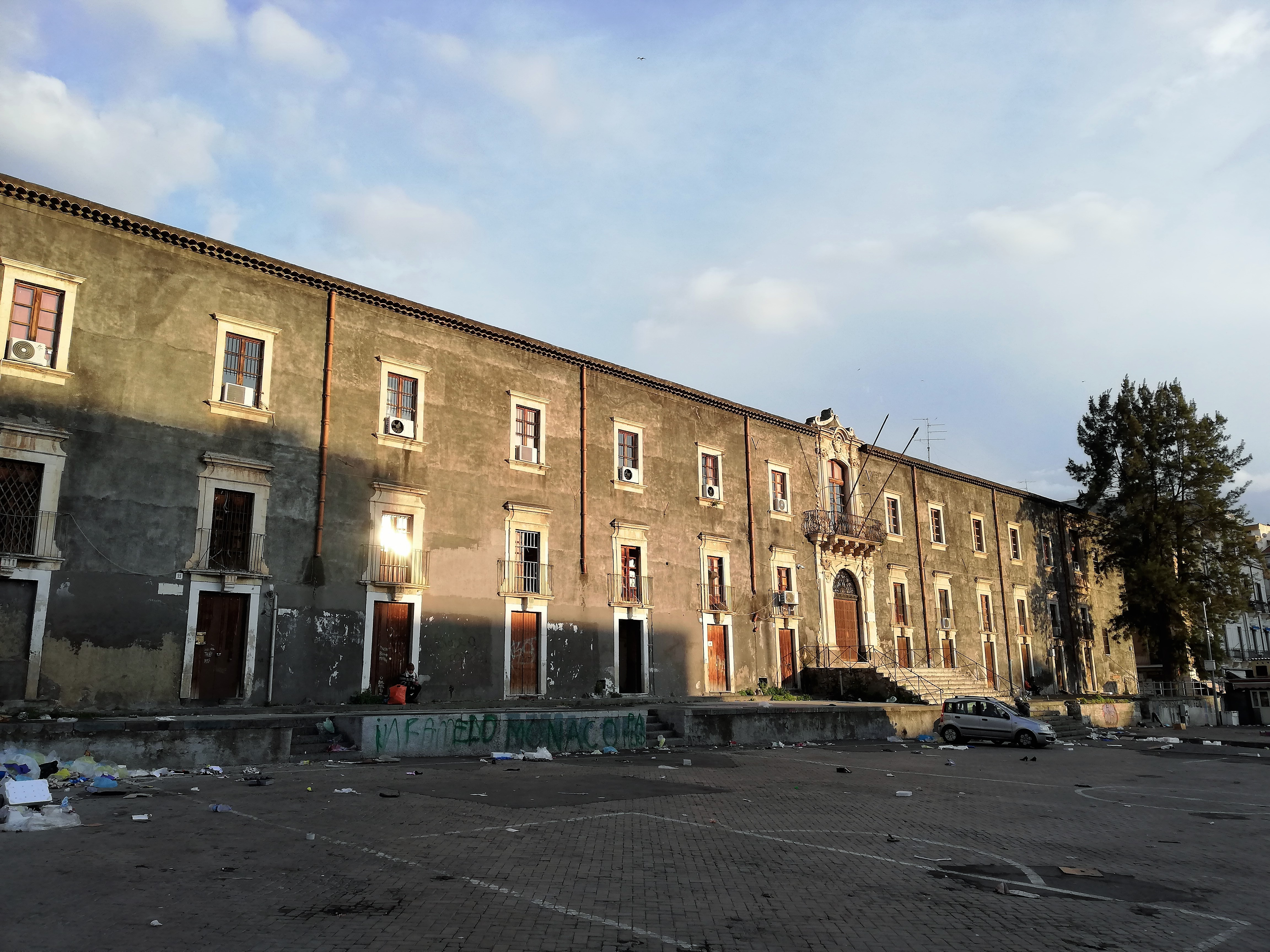 Convento.